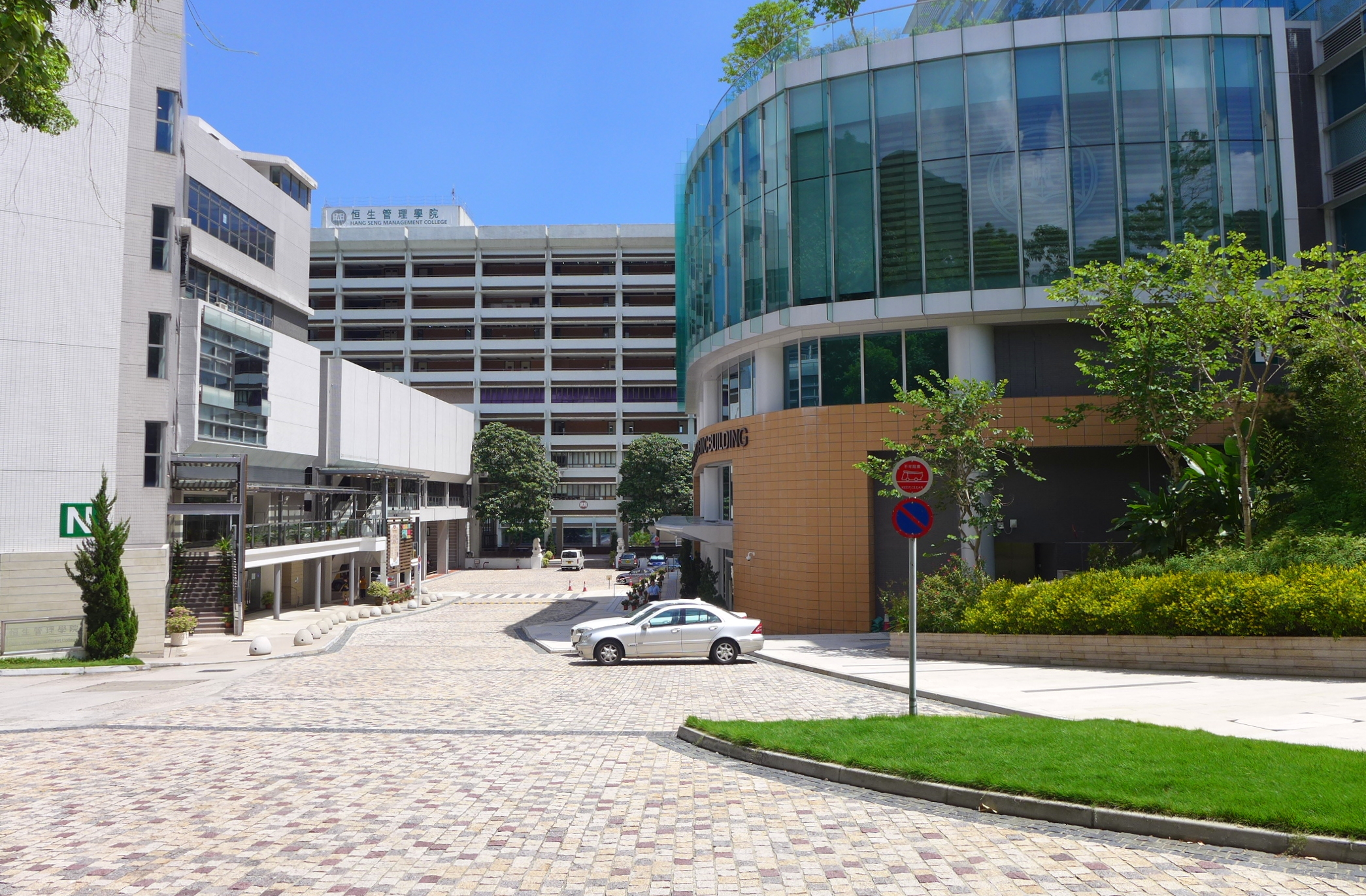 Hang Seng Management College